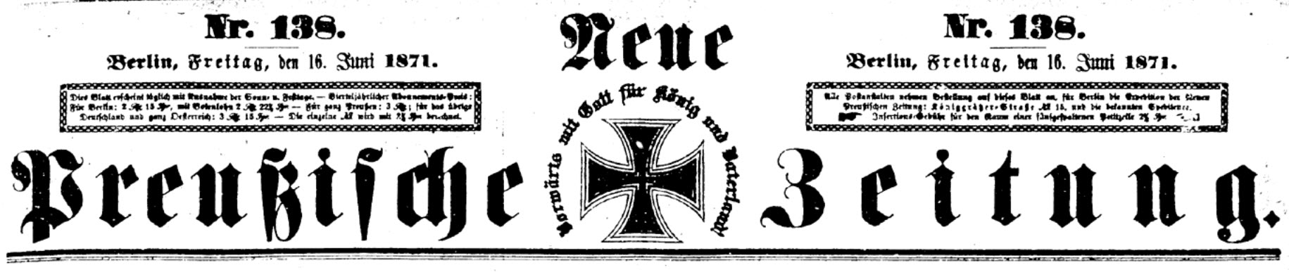 Kreuzzeitung Titel ab 1848